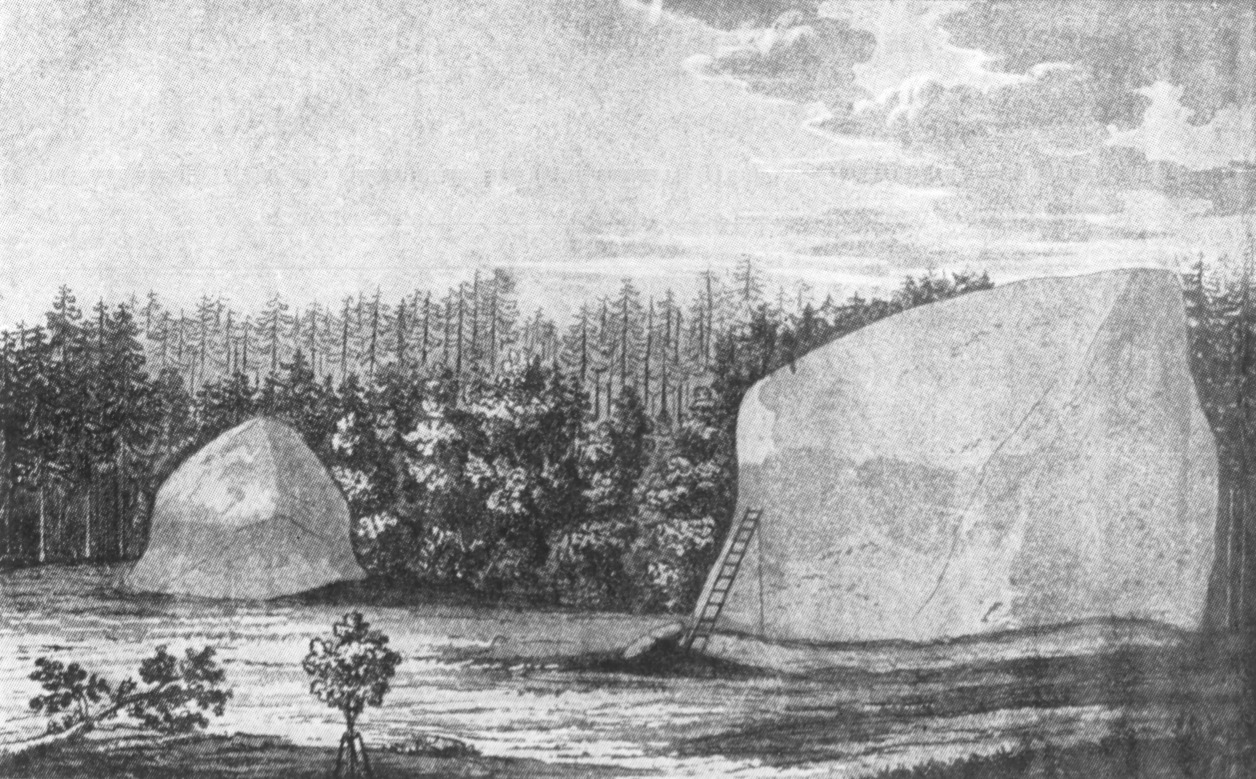 Die „Gegensteine“ auf den Rauenschen Bergen (nach W. Schultz, 1821).